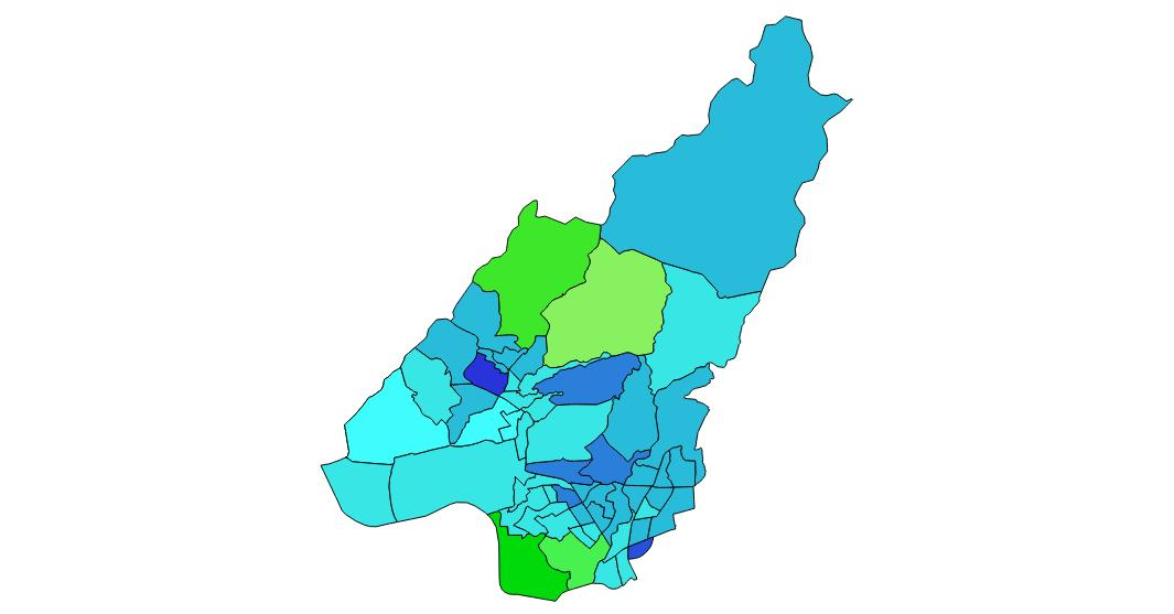 中文（中国大陆）: 蓝色为中国国民党候选人丁守中获胜的里，绿色为民主进步党候选人杨烈获胜的里。